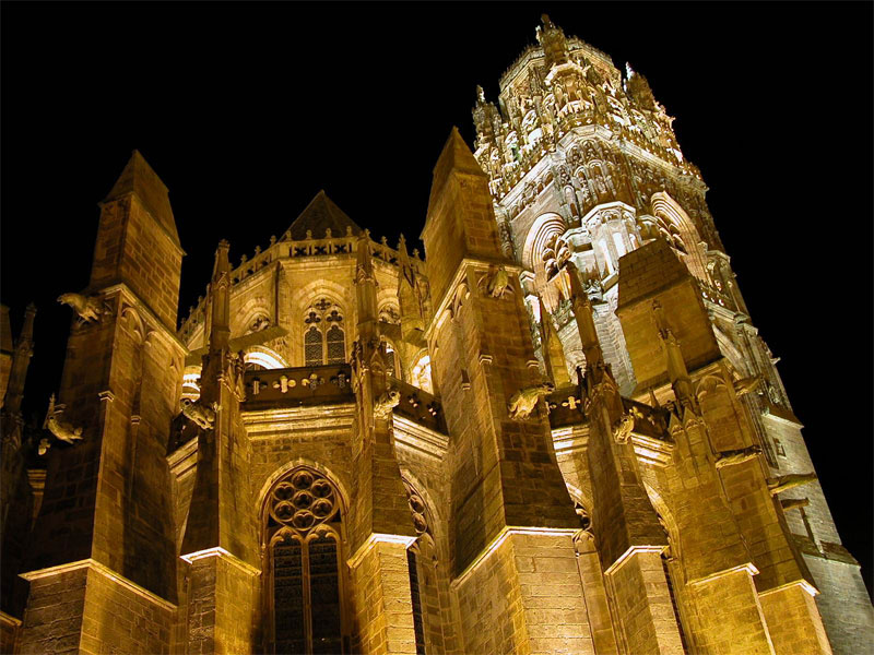 Notre Dame de Rodez illuminée telle qu'elle est observable de la Maison de Benoît